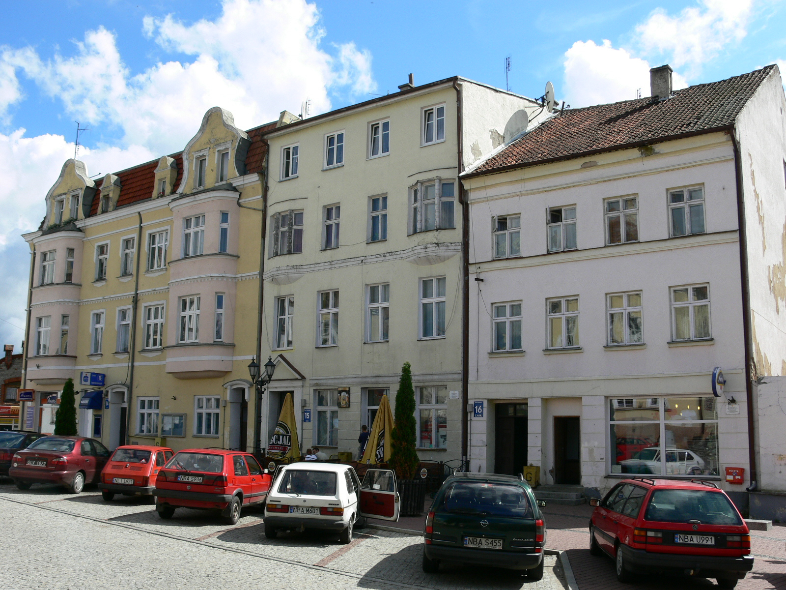 Górowo Iławeckie - kamieniczki na górowskim rynku